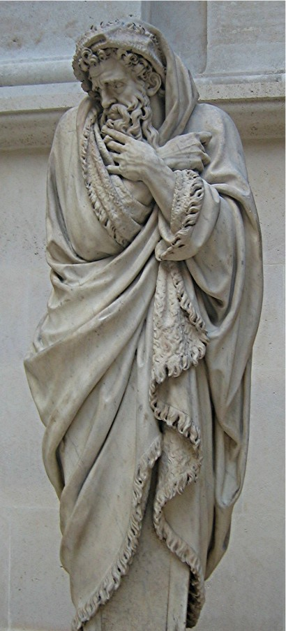 L'hiver, sculpture attribuée à Pierre Ier Legros (Musée du Louvre)